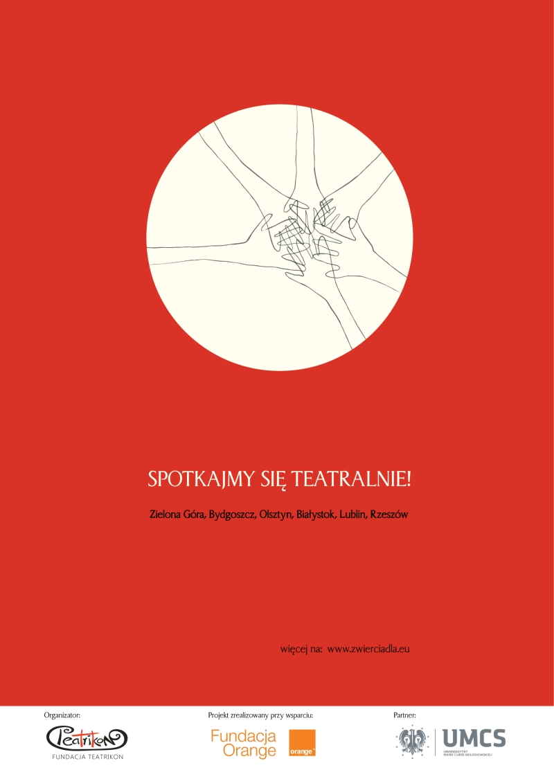 Oficjalny plakat projektu "Spotkajmy Się Teatralnie!" organizowanego przez Fundację Teatrikon